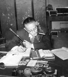 현대 가장 뛰어난 중국음악사학자인 양인리우의 연구 모습